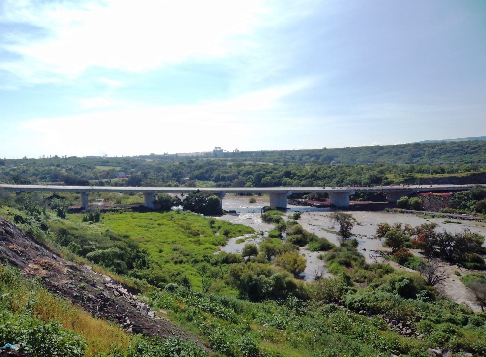 Viaduct Bridge Rio Lerma